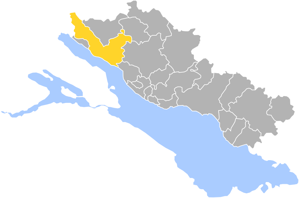 Überlingen in Bodenseekreis